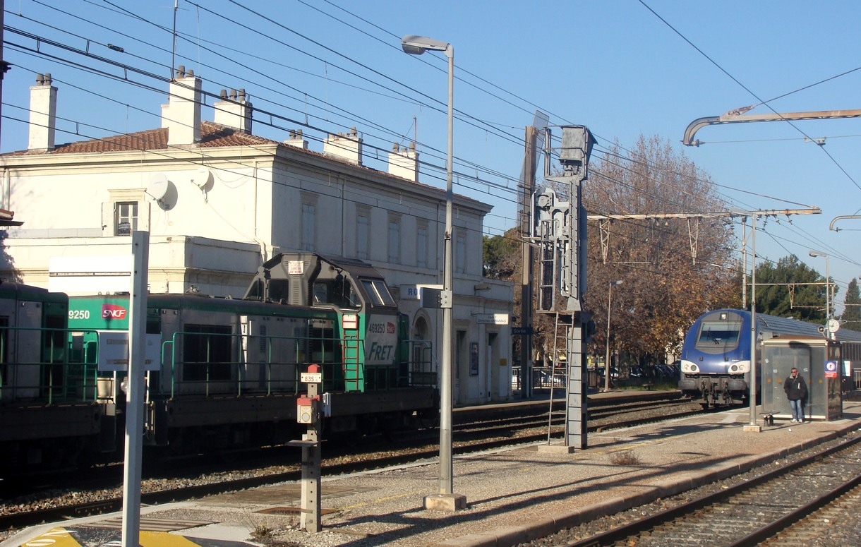 En gare de Rognac (Bouches-du-Rhône), croisement d'une rame de frêt et d'un Intercity-TER.